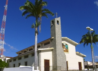 Igreja Matriz Sagrada Família de Belém-PB